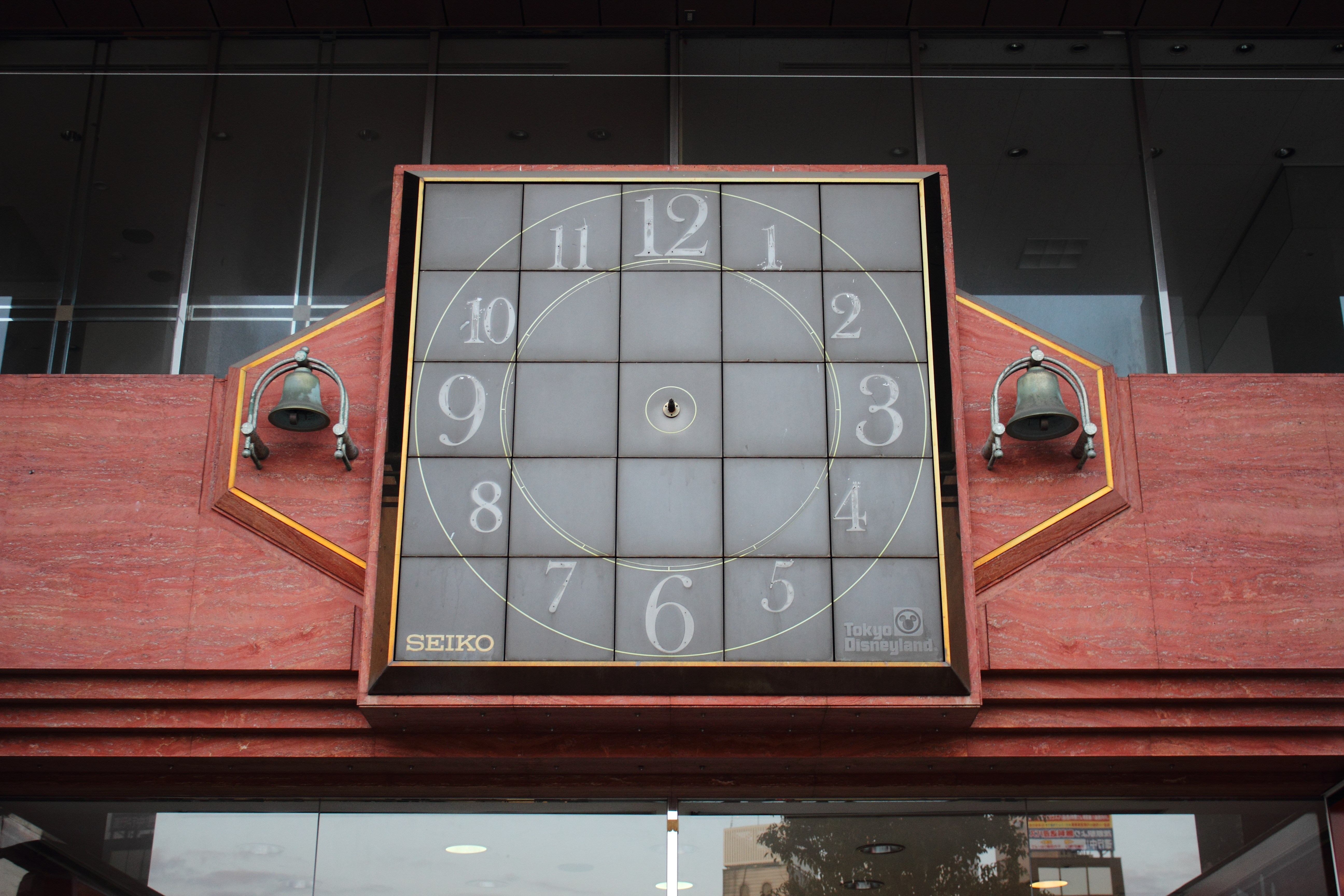 旧茂原そごうの時計。 2012年2月撮影。